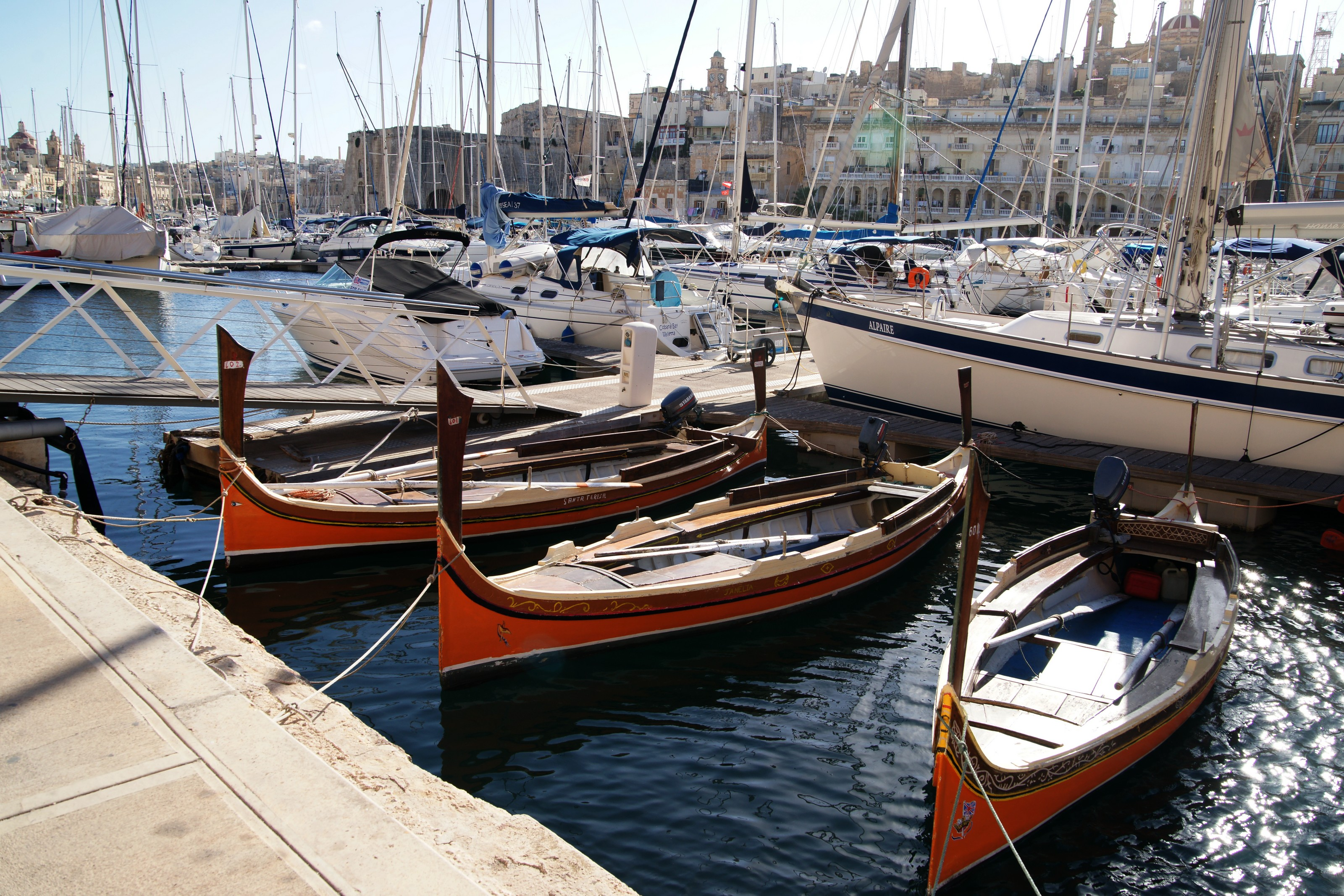 Dghajsa - Boote an der Vittoriosa Seafront